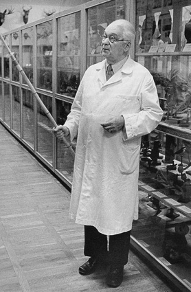 luonnonsuojelia